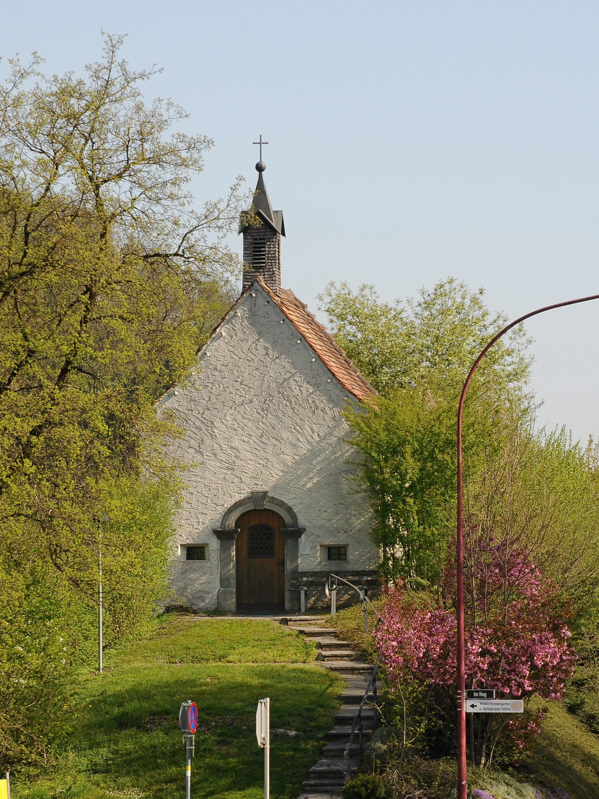 aus dem DEHIO Vorarlberg 1983: Kapelle am Kobel in Götzis, westlich der Straße auf einem Hügel stehend. Erbaut 1797 aus Dank für den Sieg gegen die Franzosen im Kampf am Kobel 1796, gestiftet von den Gemeinden Götzis, Rankweil und Koblach. 1983 restauriert. Rechteckbau mit eingezogener Apsis unter Satteldach, Glockentürmchen über der Fassade. Rundbogenportal mit Steinrahmung, im Scheitelstein bezeichnet 1997. Betraum mit Flachdecke über Gesims, Rundapsis. Info Das Objekt steht unter Denkmalschutz